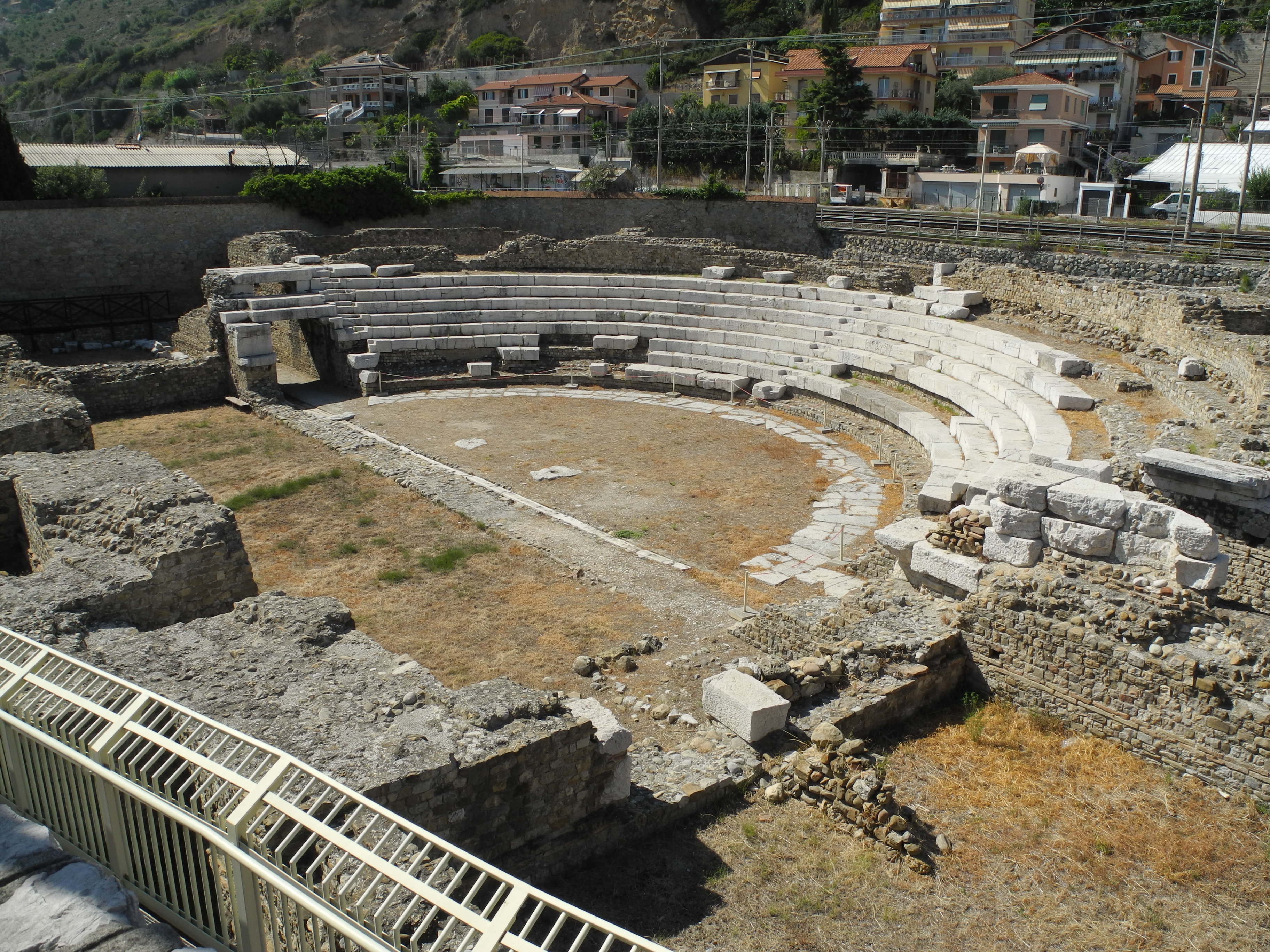 Teatro romano di Albintimilium (Ventimiglia, IM). La cavea vista da sud-est. Antiquarium e area archeologica di Albintimilium - MIBAC